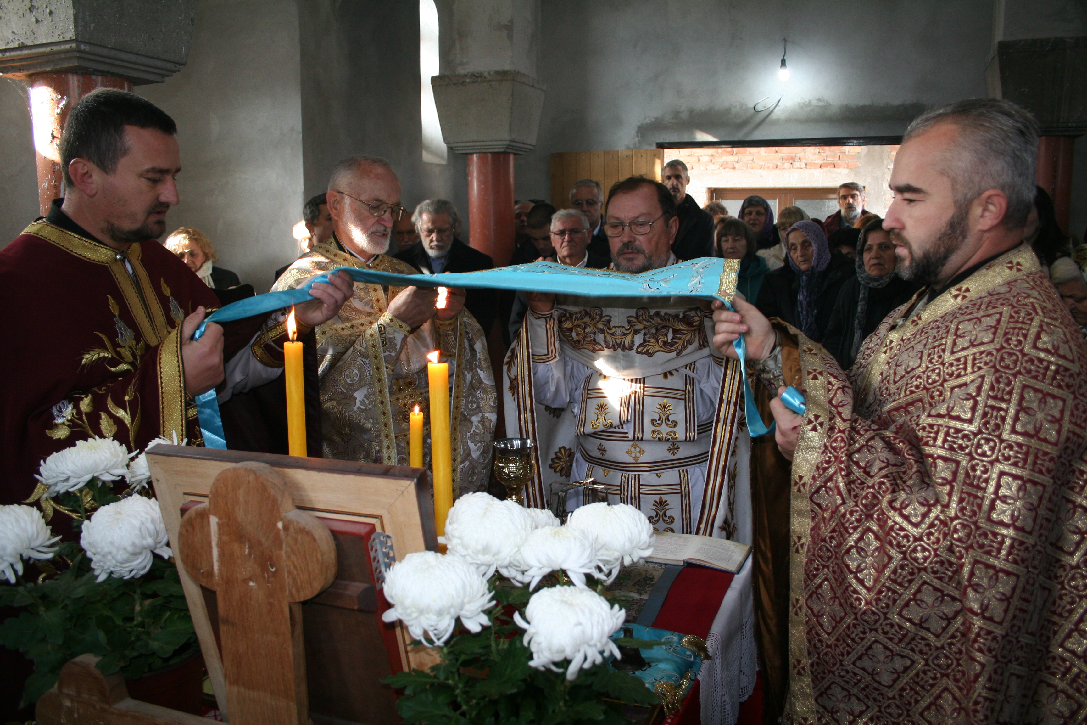 Slava crkve ikone Bogorodice Kazanjske, Provo